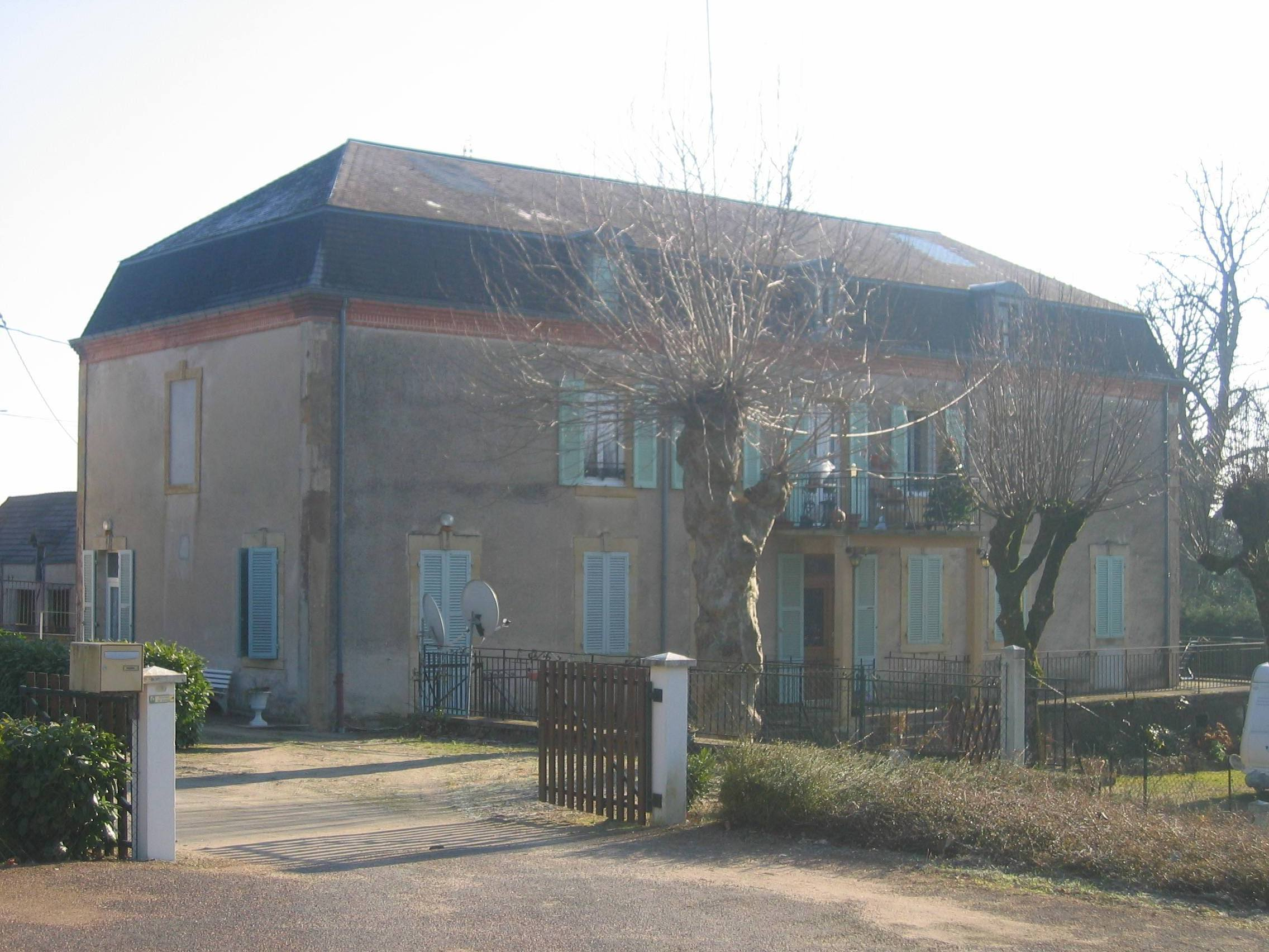 Chateau des Bécauds (Neuilly en Donjon)